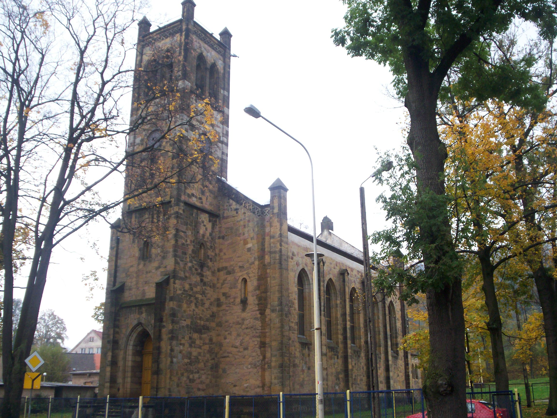 Polska. Powiat Kamienna Góra, miasto Lubawka, kościół poewangelicki.